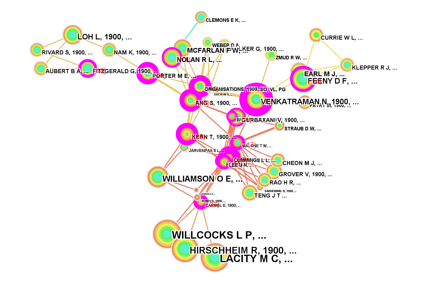 Ergebnis einer CiteSpace-Analyse Thema: Outsourcing Selbsterstellt im Rahmen einer Seminararbeit